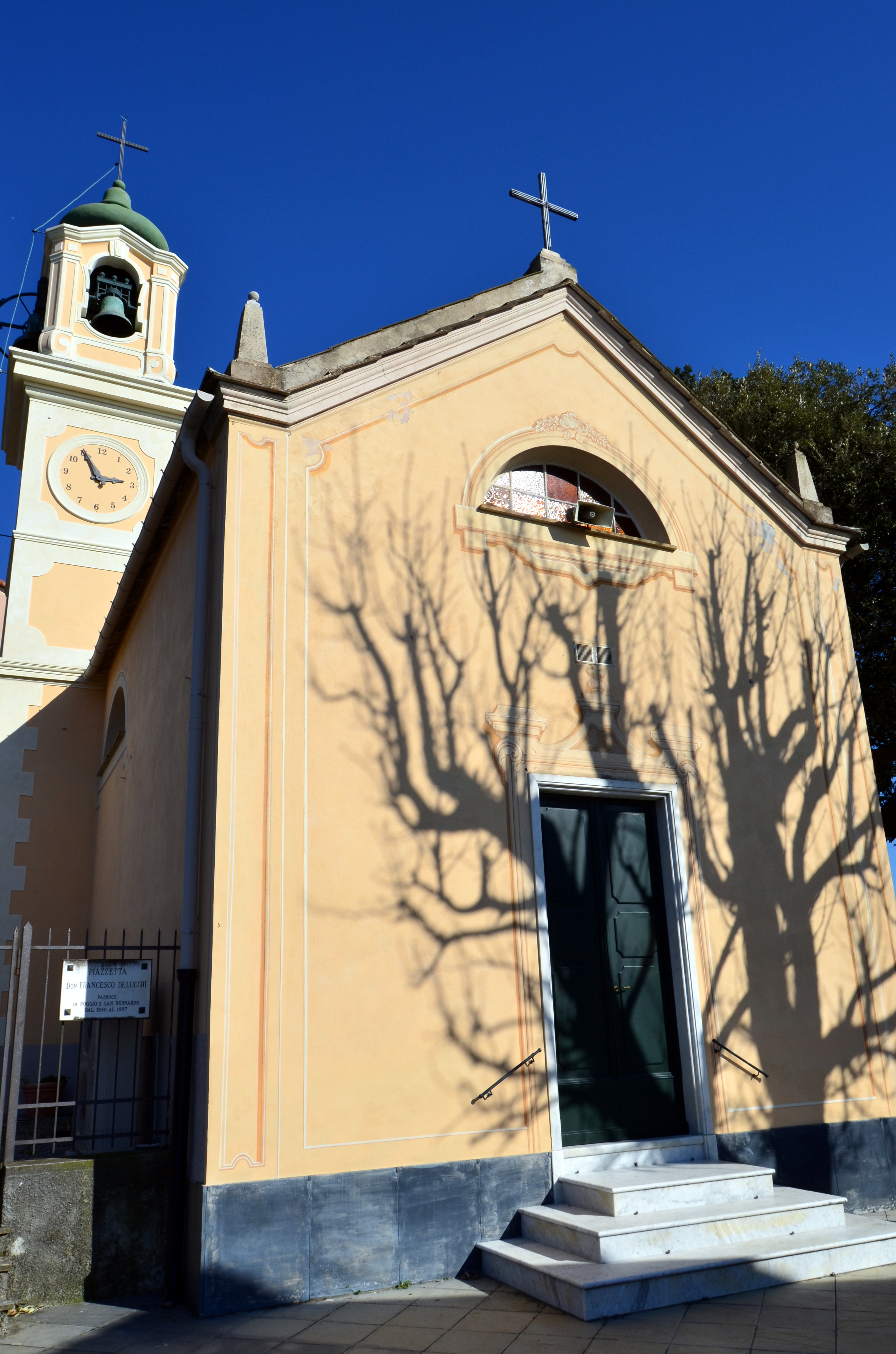 Chiesa di San Bernardo, San Bernardo, Bogliasco, Liguria, Italia